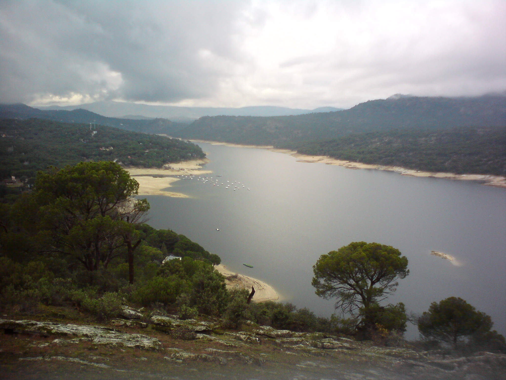 Embalse de San Juan, España.